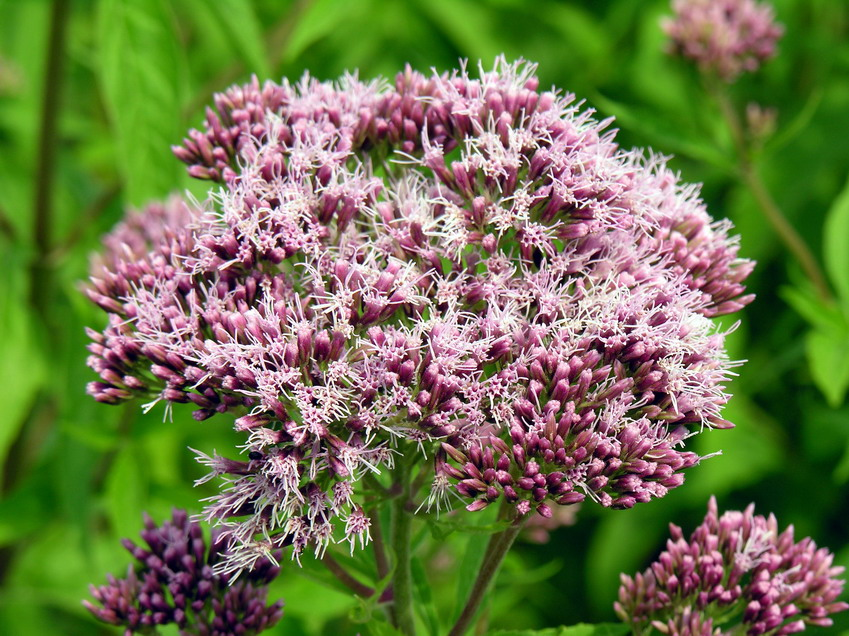 Kanapinis kemeras (Eupatorium cannabinum), žiedai Šeima. Astriniai (Asteraceae) Foto: Algirdas, 2006 m. liepos 22 d., Lietuva